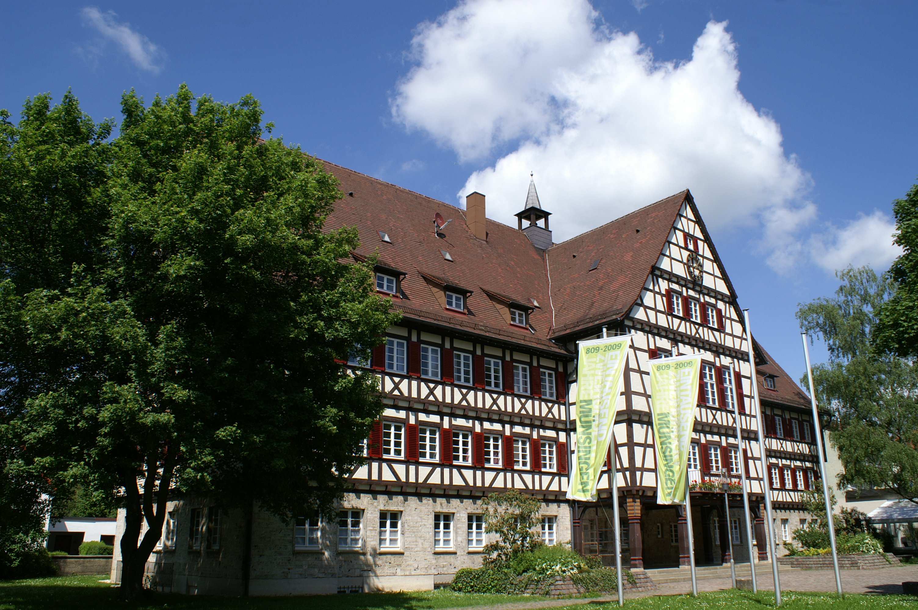 Das Neue Rathaus in Münsingen wurde 1935 - 1937 in traditioneller Fachwerkbauweise in den Obergeschossen auf Tuffstein im Erdgeschoss erbaut. Der Behördenbau aus der NS-Zeit hat eine wechselvolle Geschichte hinter sich. Untergebracht waren: Kreisverband und Stadtverwaltung, französische Militärregierung, Landkreis Münsingen. Nach der Auflösung des Landkreises Münsingen wurde das Gebäude 1972 Sitz der Stadtverwaltung.